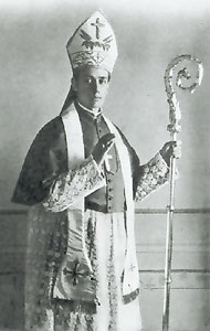 Ксёндз-біскуп Зыгмунт Лазінскі